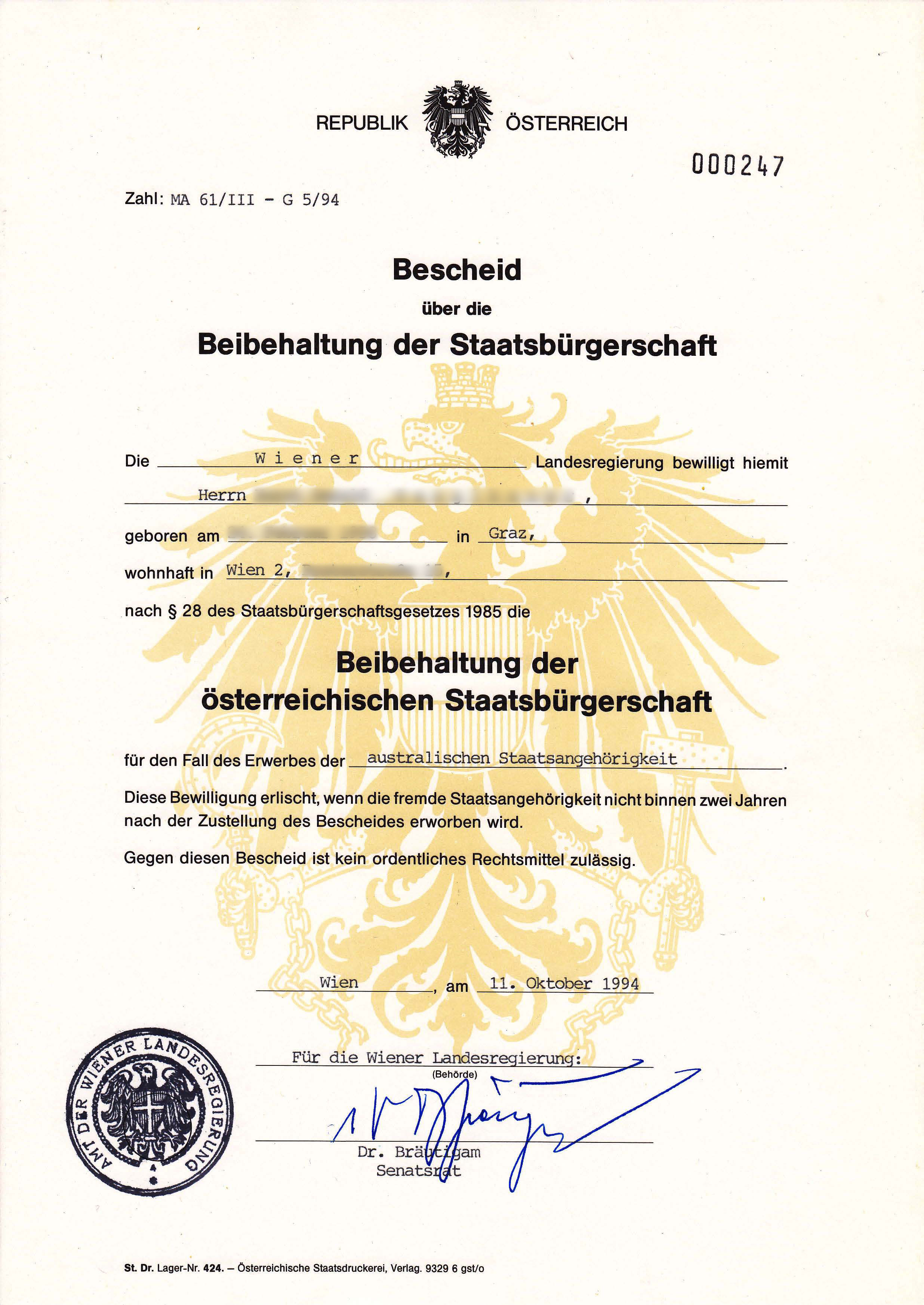 Bescheid über die Beibehaltung der österreichischen Staatsbürgerschaft.